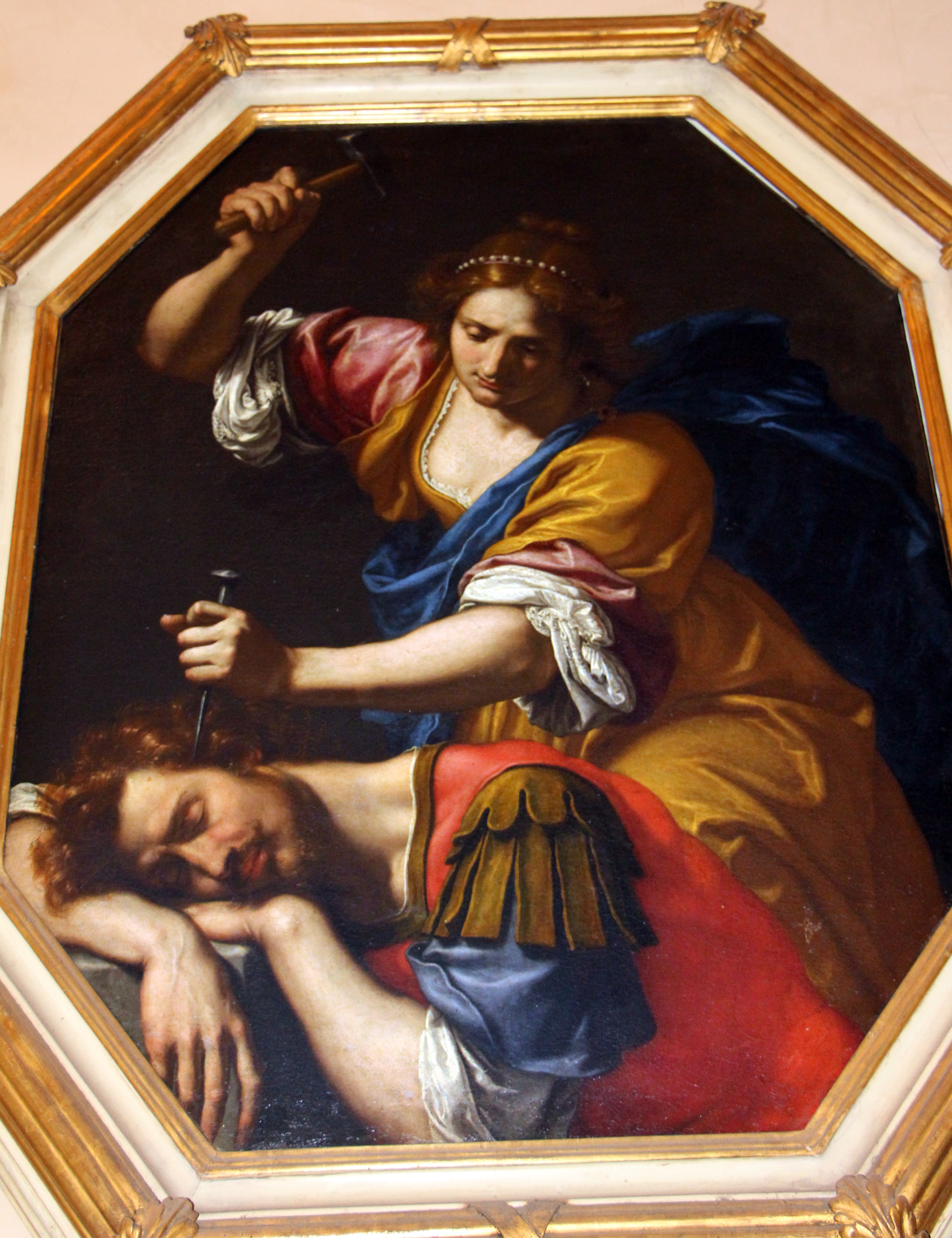 Seminario Arcivescovile Maggiore (Firenze)